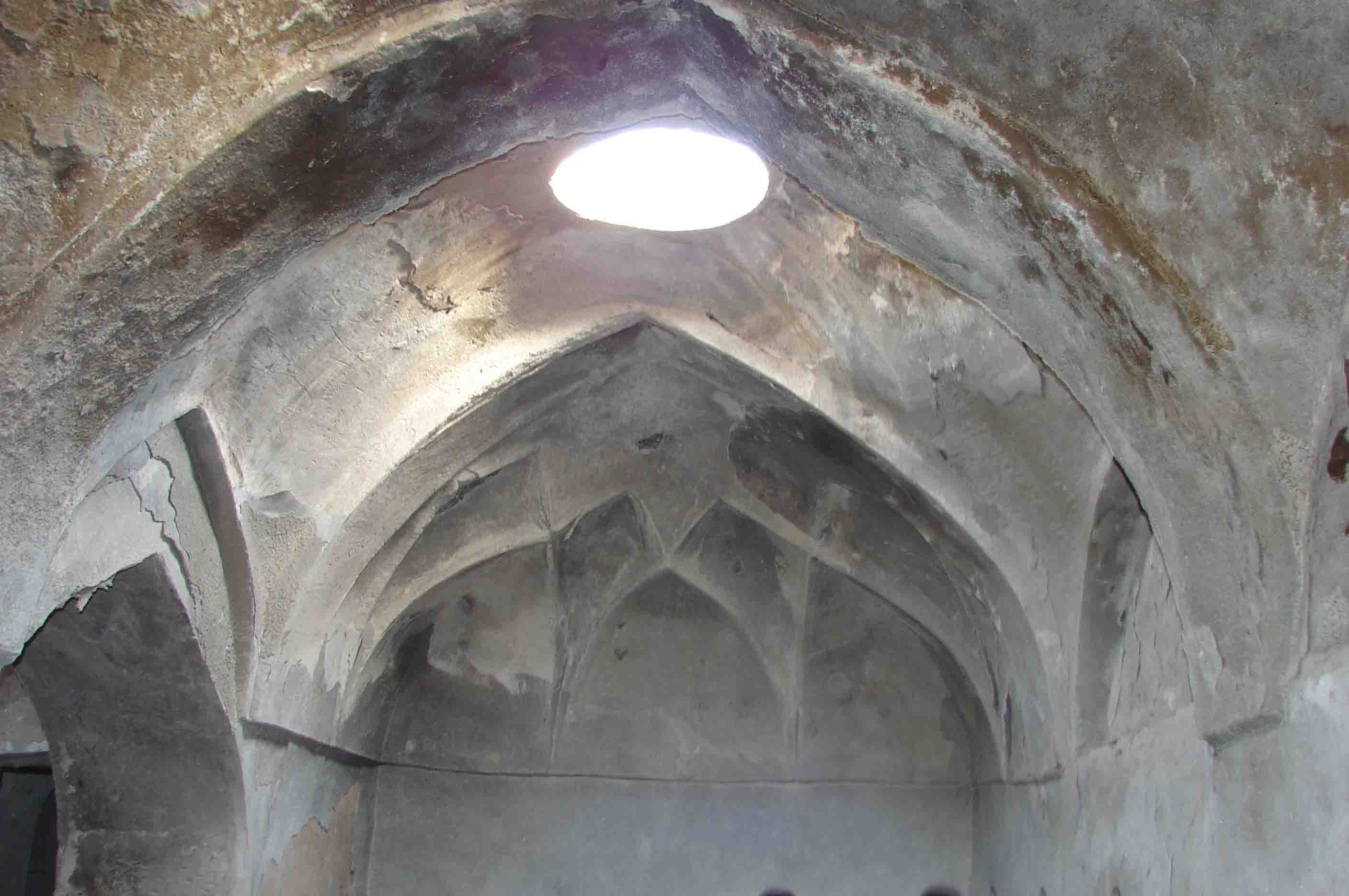 حمام خضر جويم نمای داخلی